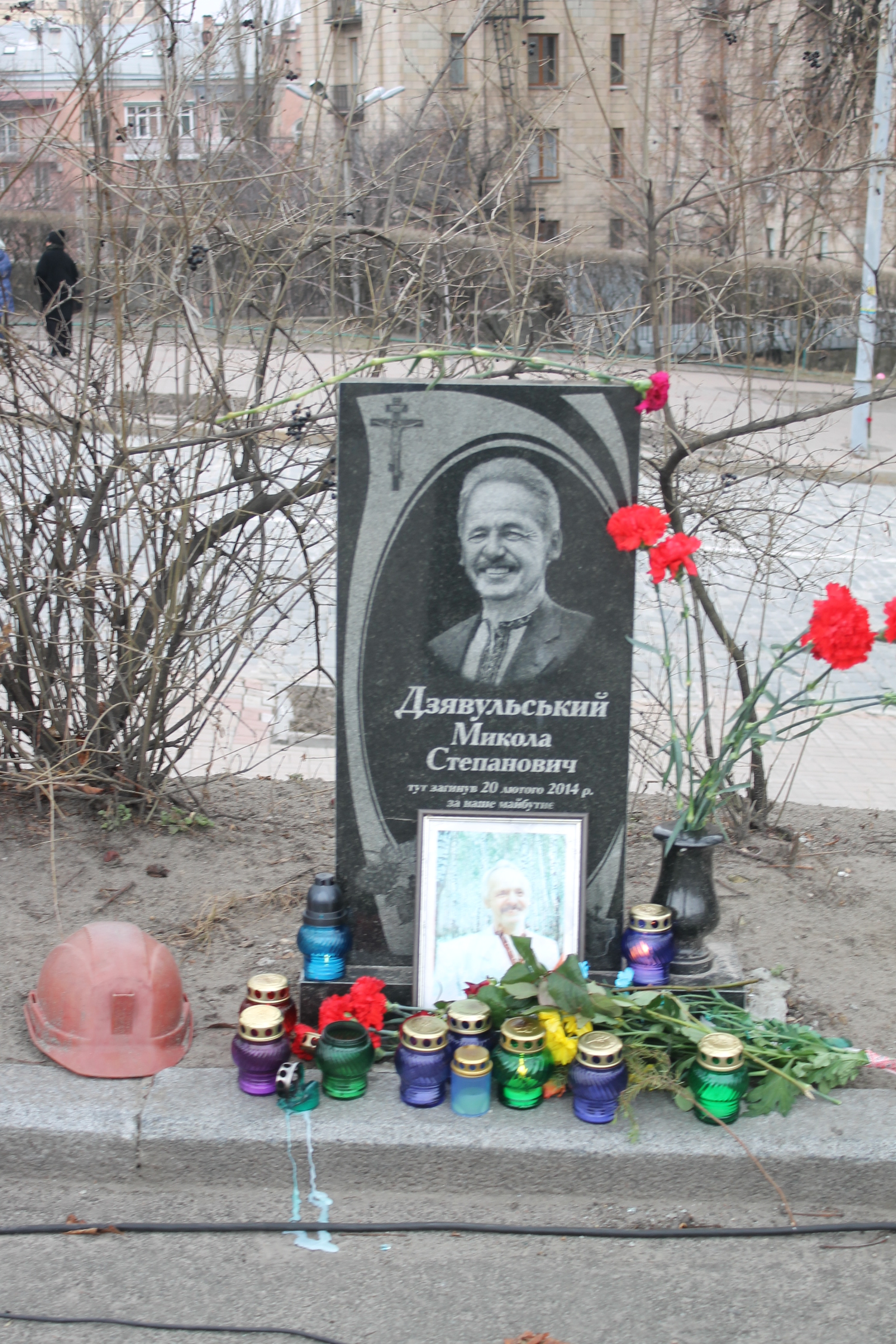 Вшанування загиблих героїв Євромайдану. Київ 20 лютого 2016